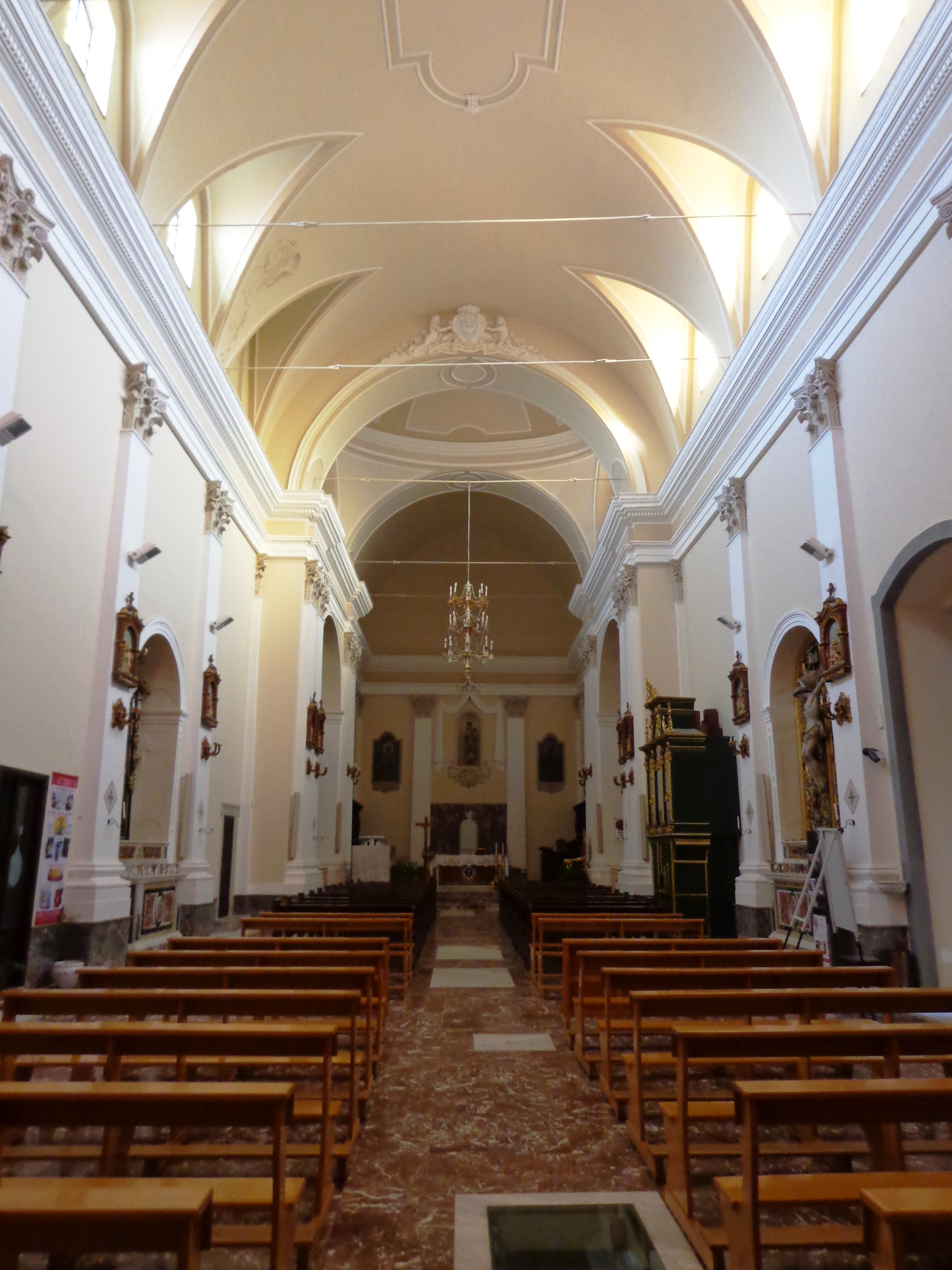 Cattedrale Patti 07